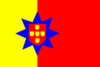 Bandeira de Poortugaal.